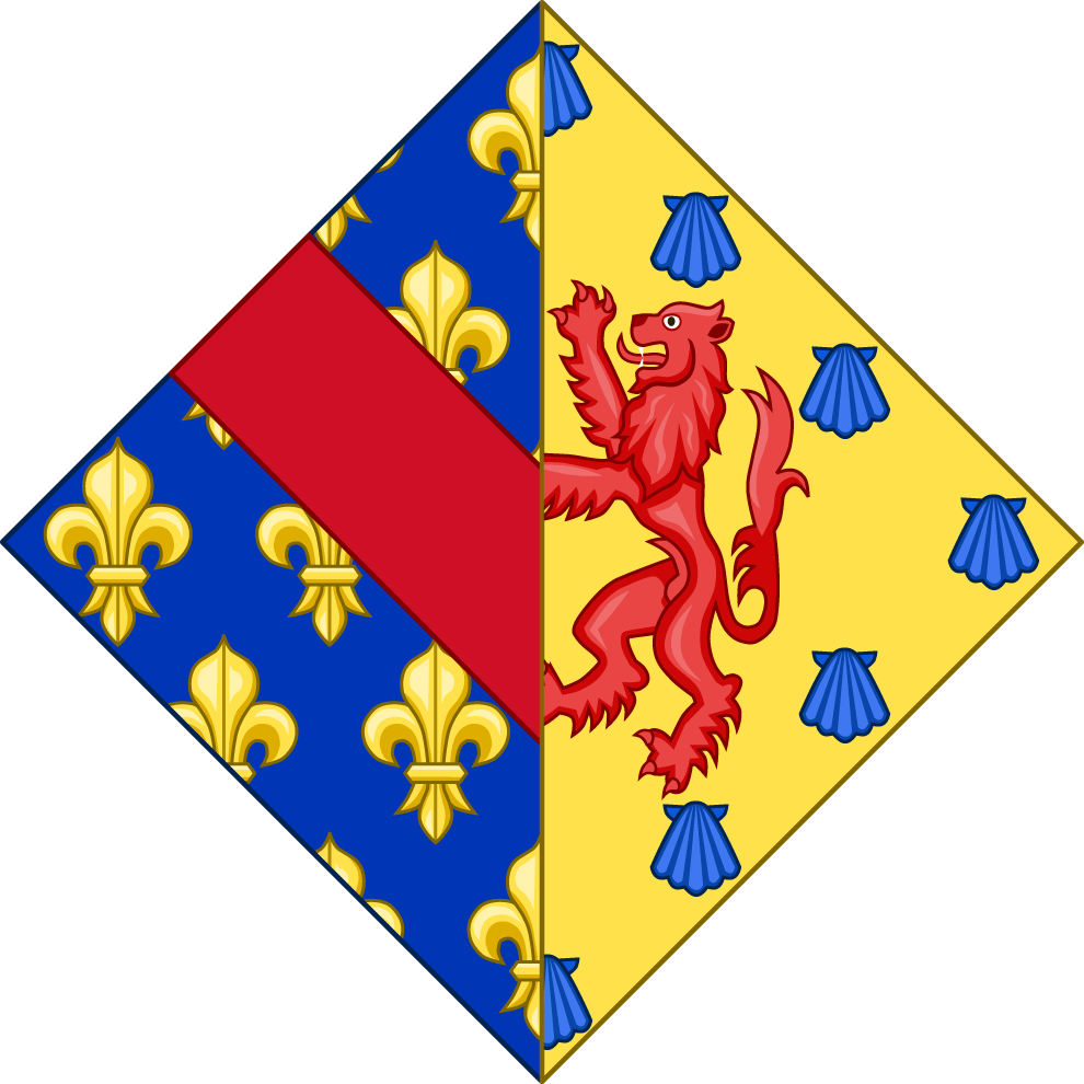 Armes de Béatrice de Bourgogne, dame héritière de Bourbon